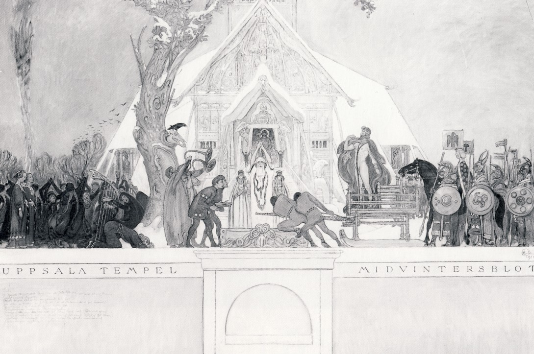 Carl Larsson, Midvinterblot, skiss 1, 1911